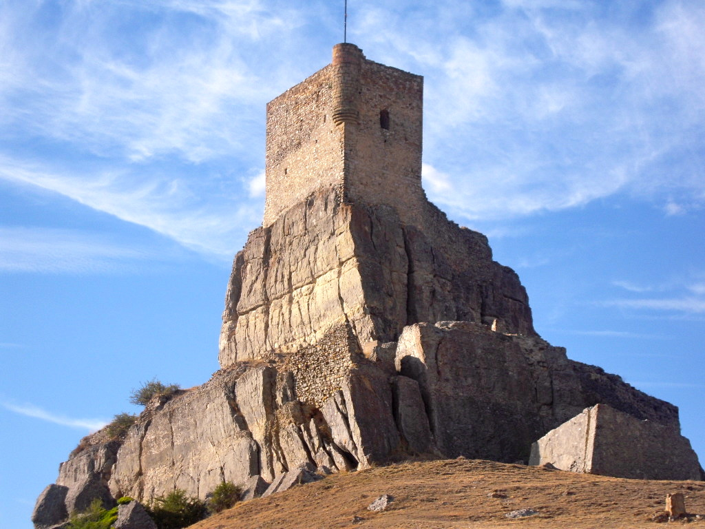 Castillo de Atienza Guadalajara